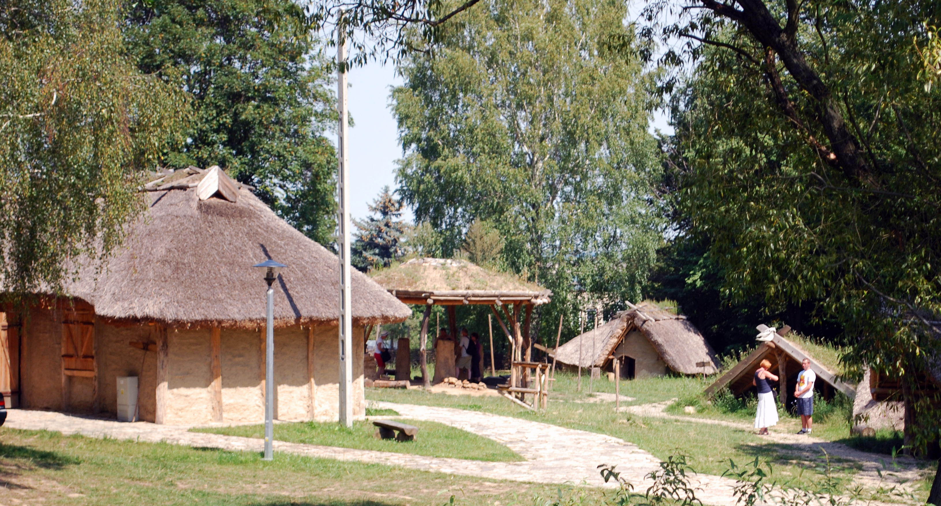 Centrum Kulturalno-Archeologiczne w Nowej Słupii: Widok ogólny na chaty